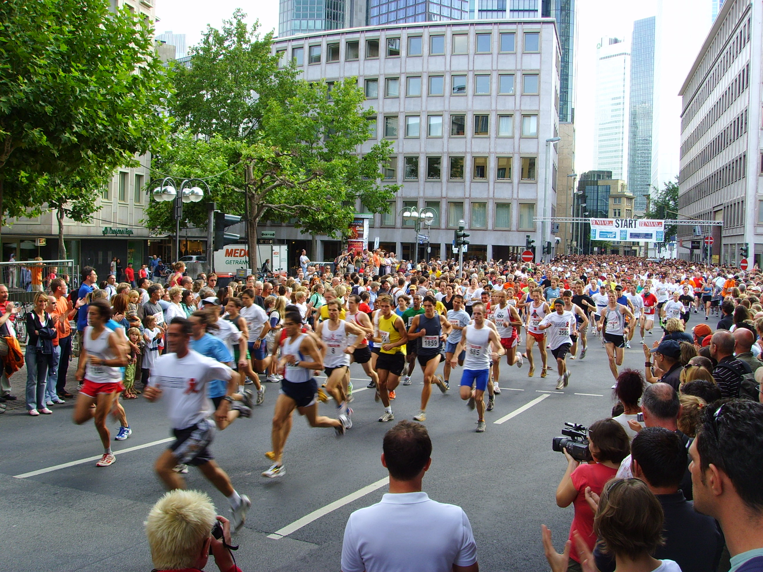 Start zum "Lauf für mehr Zeit" 2006 / 10. September 2006, 17.00 Uhr, Frankfurt am Main